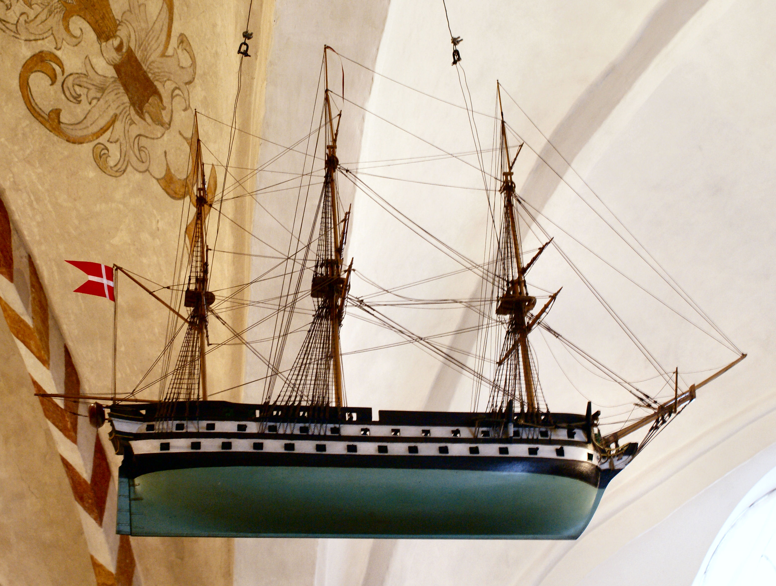 Odden Kirke, kirkeskib, model af linjeskibet Prinds Christian Frederik fra slaget ved Sjællands Odde